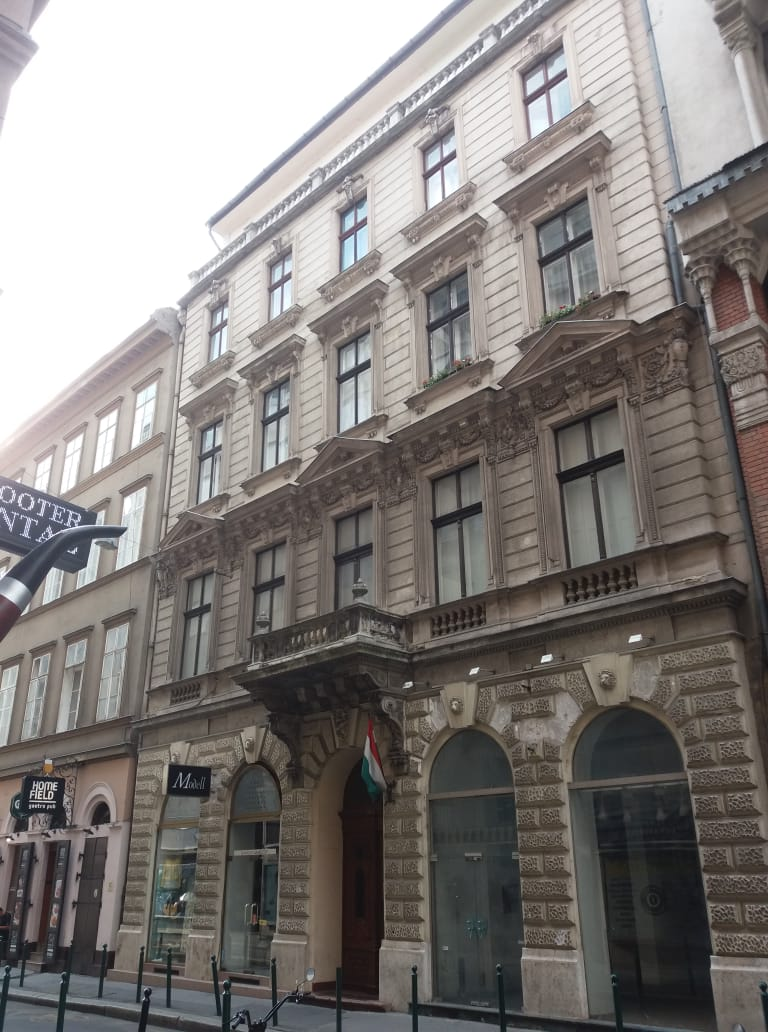 Régi Posta utca 6 - Lenz bérház - Budapest - A "Lenz Testévek" déligyümölcs kereskedő cég egykori székhelye és bérháza (Budapest V., Régi Posta utca 6.)